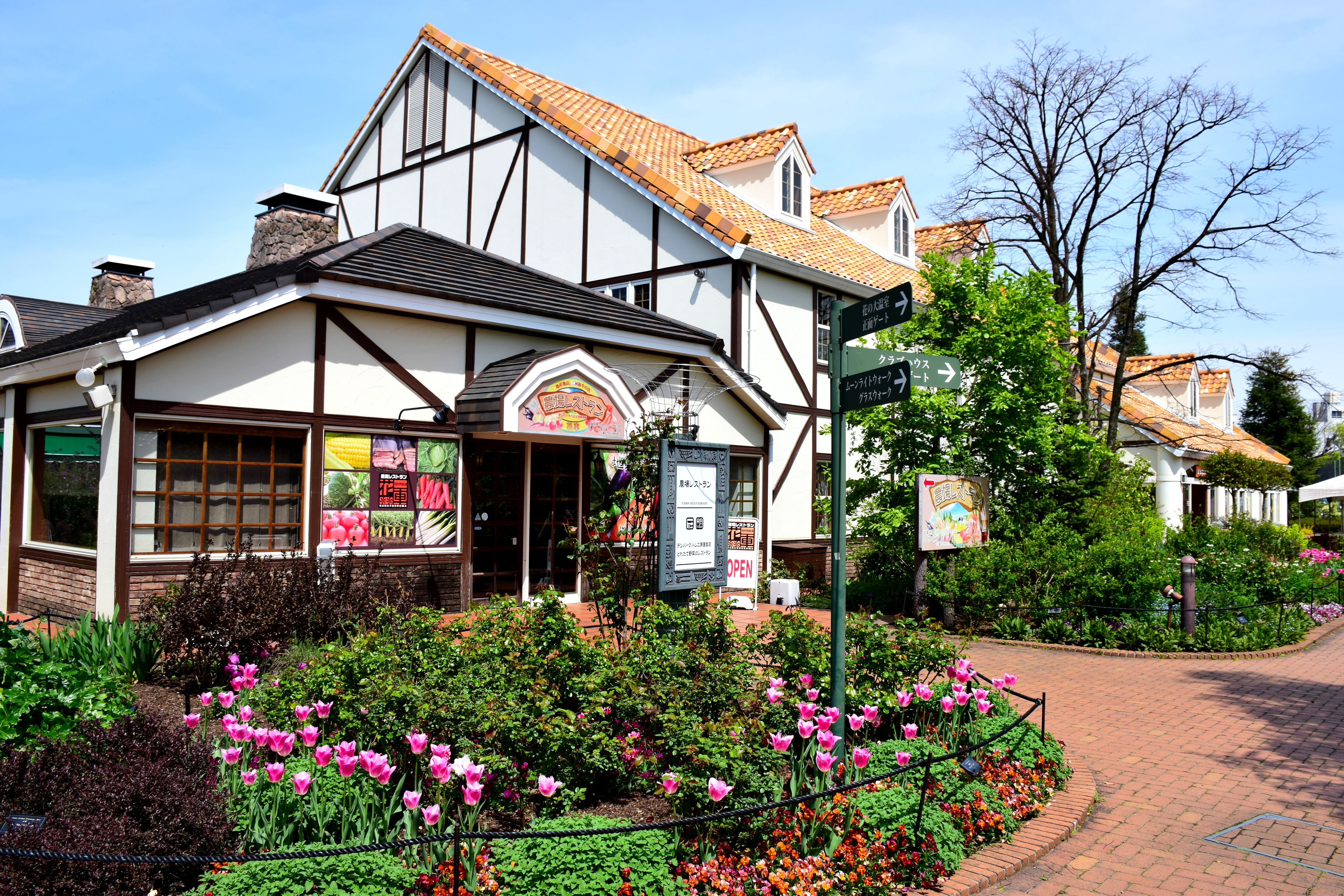 安生産業文化公園デンパーク。農場レストラン 花車。